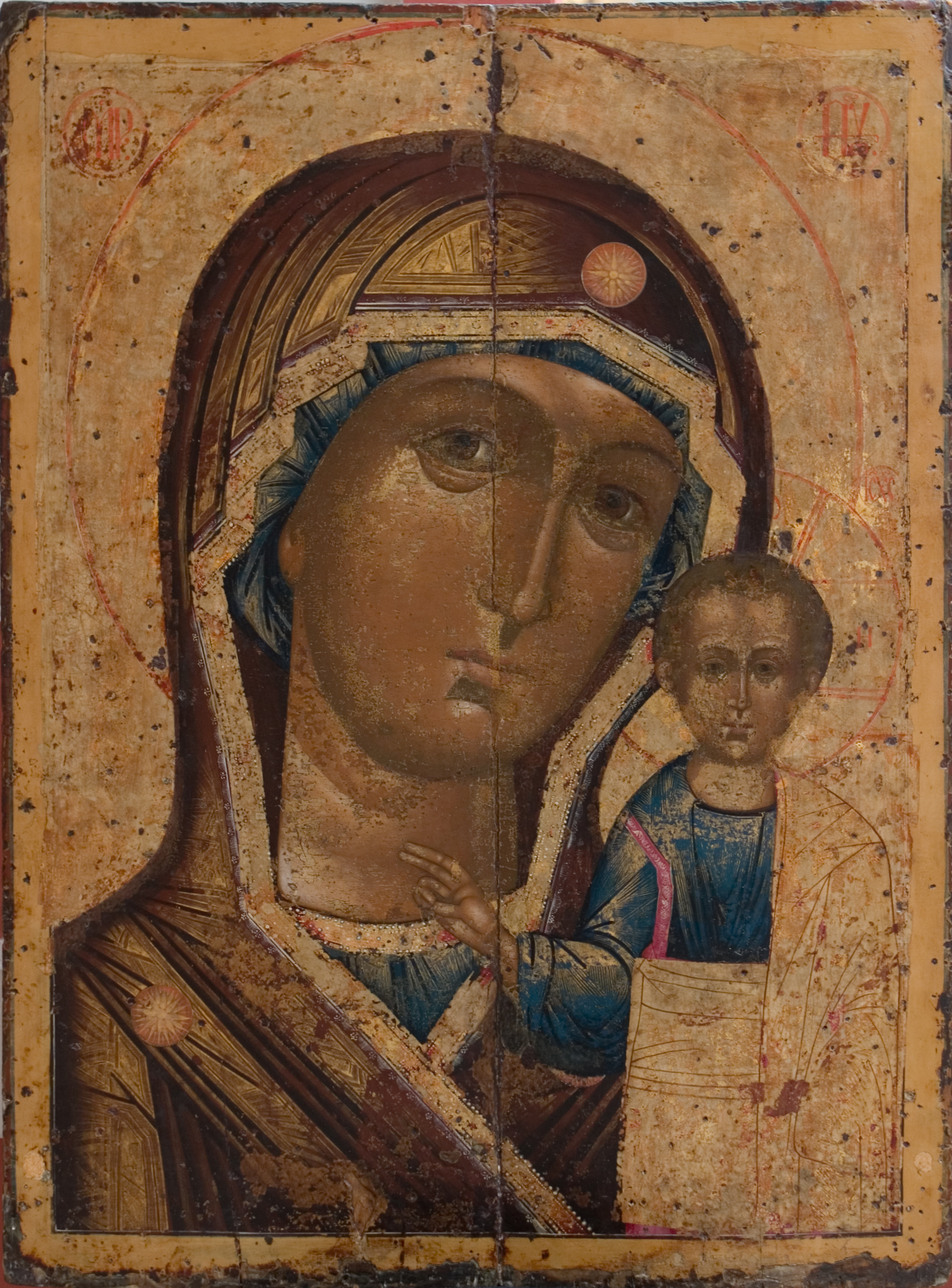 Икона Свято-Троицкого собора – один из древних списков с чудотворного первообраза. Этот образ был написан в XVIII веке. Впоследствии икону неоднократно переписывали. Первоначальный образ скрывали несколько слоев поздней записи. В 2005 году икона была отреставрирована. Икона является не только чтимой святыней, но и памятником искусства.